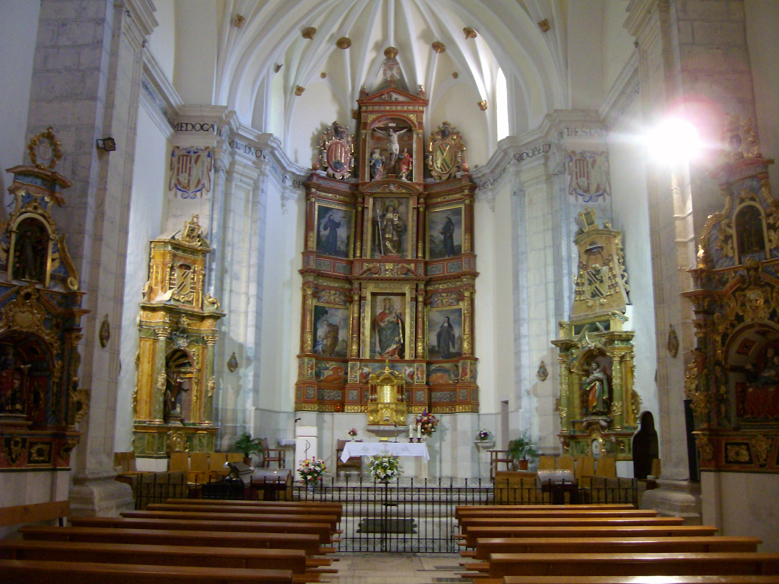 Capilla mayor y retablos de la iglesia conventual de Santa Clara (Cuéllar)